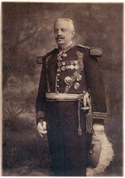 Fotografía del General Aureliano Blanquet